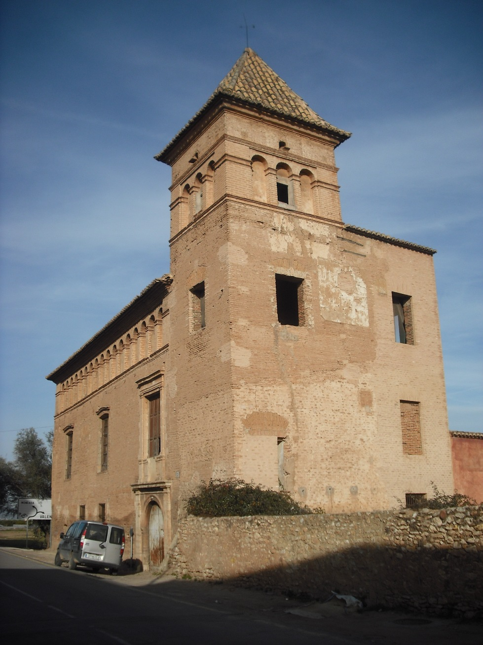 Casa de la Sirena. Aunque está en el casco de Benifaraig, pertenece al municipio de Alfara del Patriarca